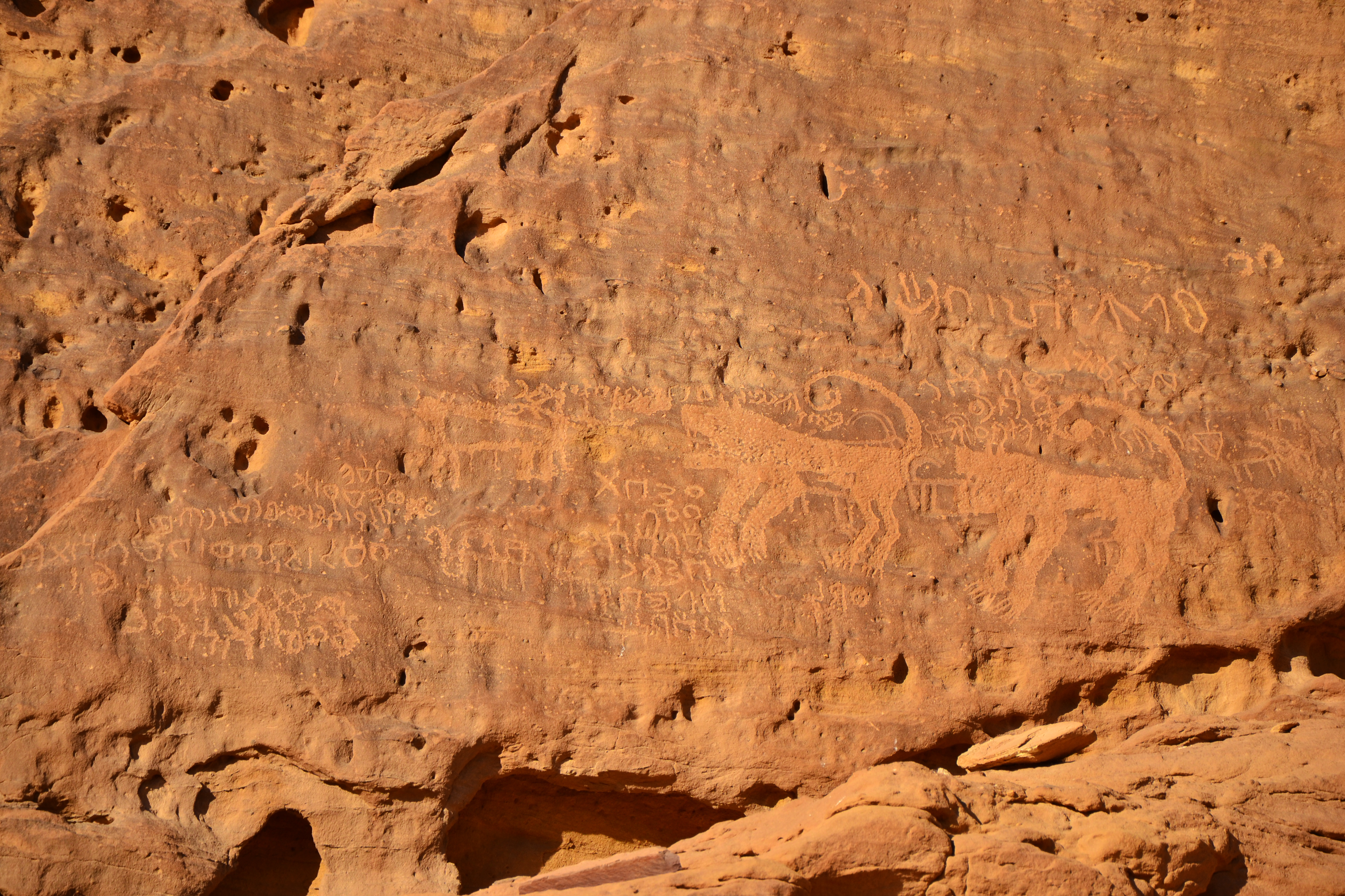 Madain Saleh